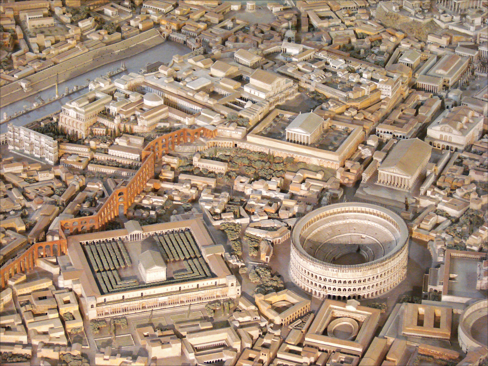 La maquette de Rome à l'époque de Constantin (306-337) réalisée par Italo Gismondi entre 1933 et 1937. Cette maquette de 200 m de long est présentée au musée de la civilisation romaine à l'EUR à Rome. Elle est à l'échelle 1/250. Photo Annie Dalbéra